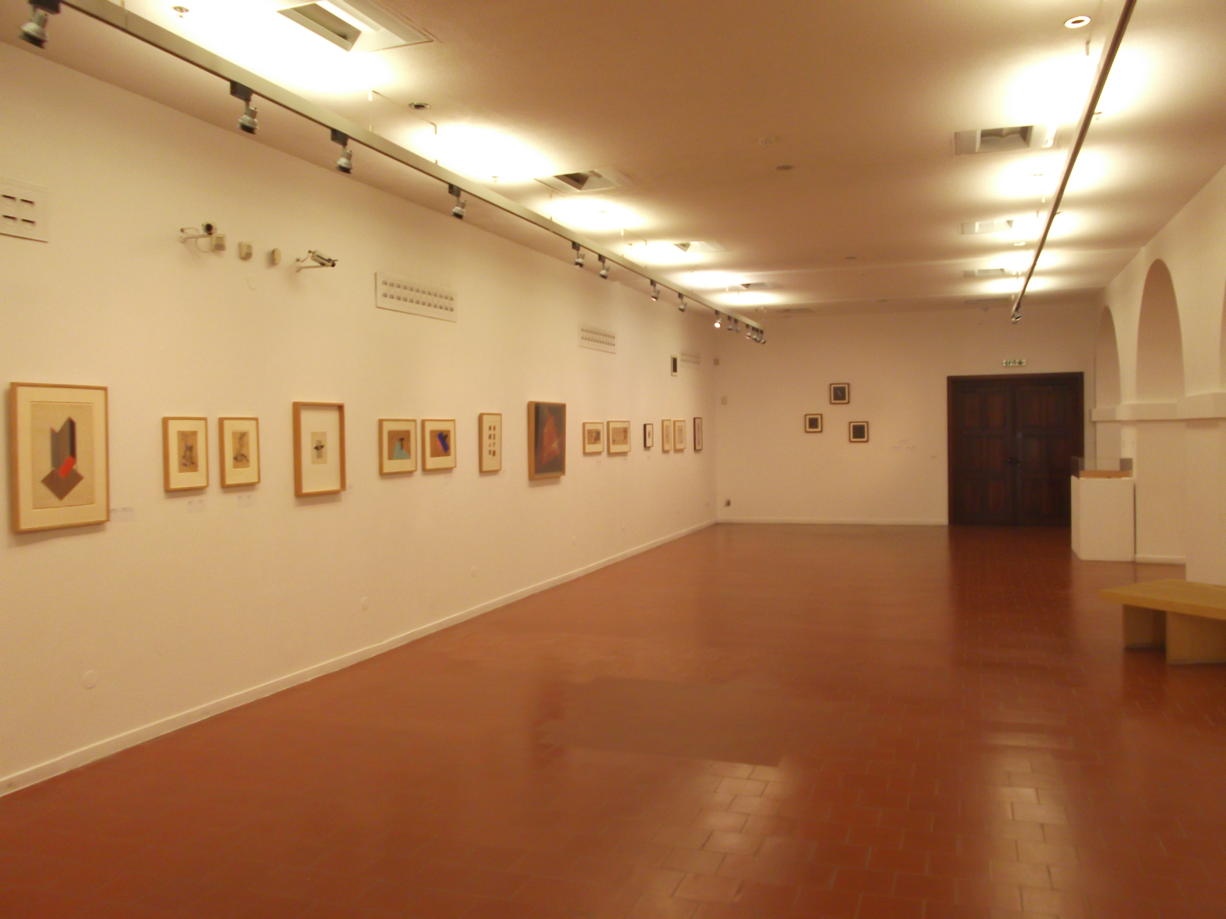 Άποψη από το εσωτερικό του Κρατικού Μουσείου Σύγχρονης Τέχνης.